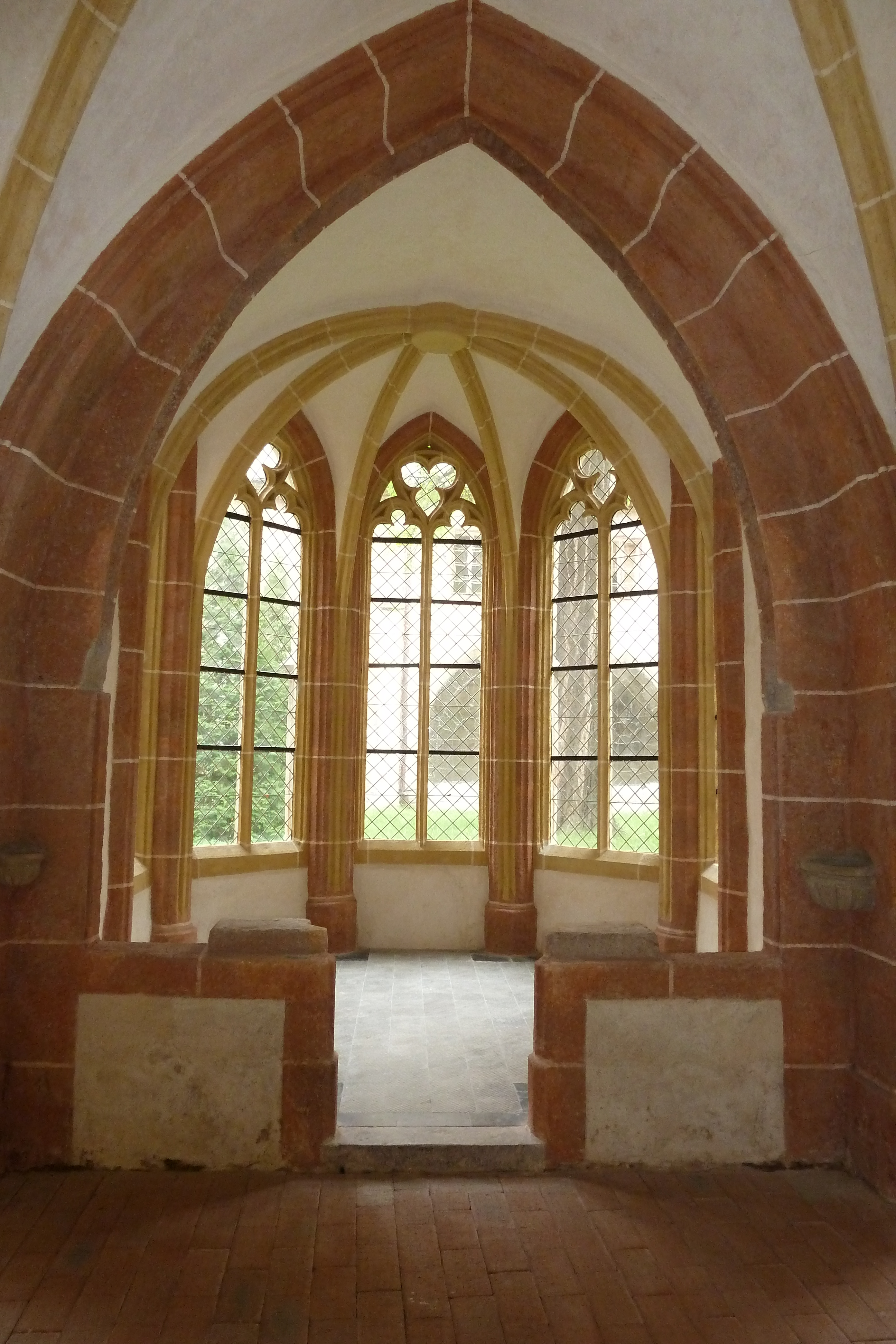 Výklenek ambitu